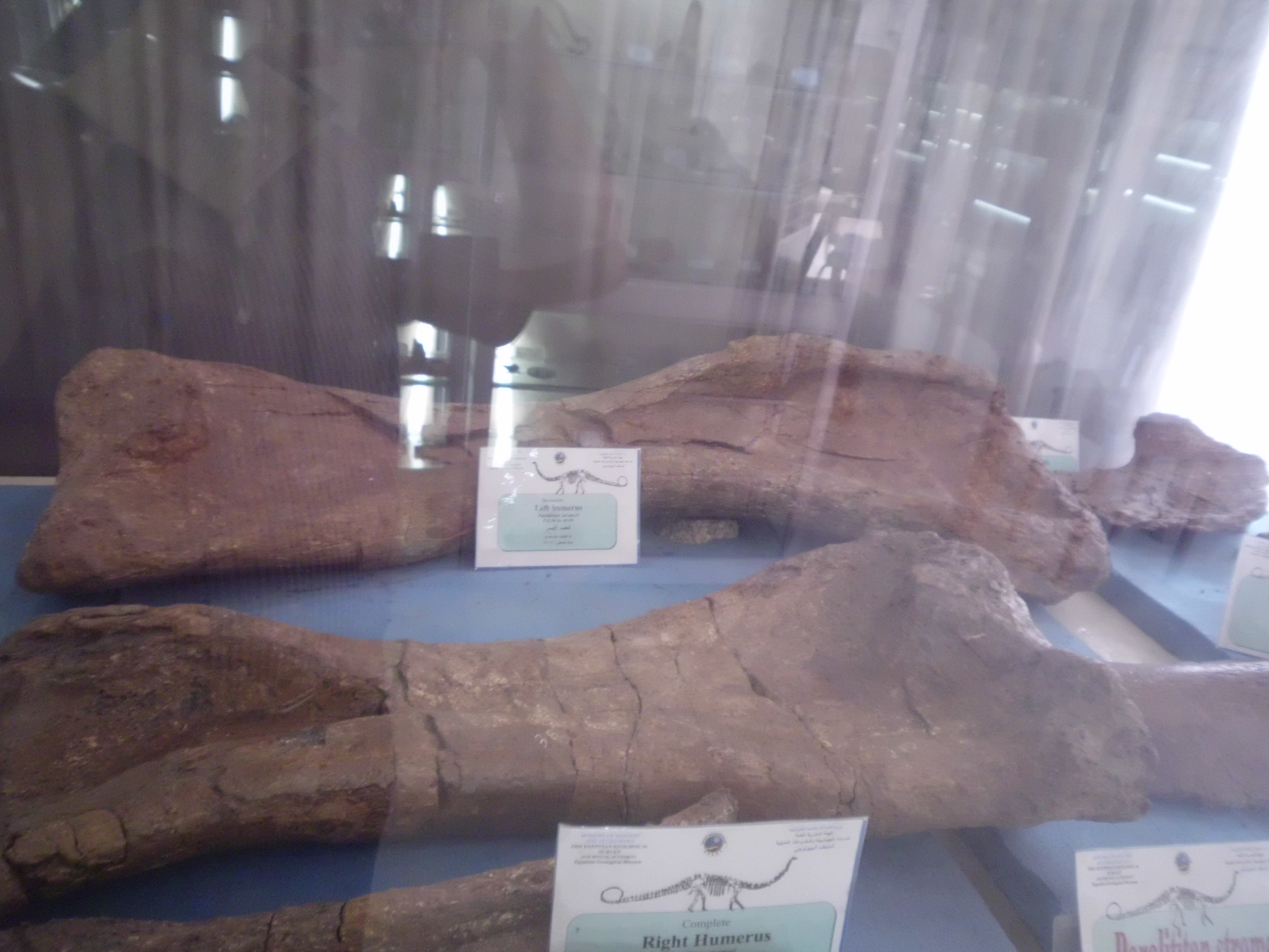 هو احد انواع الديناصورات اكلة الاعشاب في العصر الطباشيري المتاخر بمنطقة الواحات البحرية منذ ما يقرب من 95 مليون سنة وتم اكتشافه بواسطة المساحة الجيولوجية المصرية عام 2000 وكلمة الباراليتيتن كلمة لاتينة تعني (ديناصور المد والجزر) وهو ديناصور اكل للاعشاب يمتاز بحجم جمجمة صغير ورقبة طويلة واطراف امامية مساوية في الطول للاطراف الخلفية وذيل طويل وبلغ وزنه 80 طن وطوله 33,5 متر ويعد ثاني اضخم ديناصور في العالم في العصر الطباشيري وكان فريسه سهله لديناصور اسبينوسورس والكركرودونت سورس والبحرية سورس